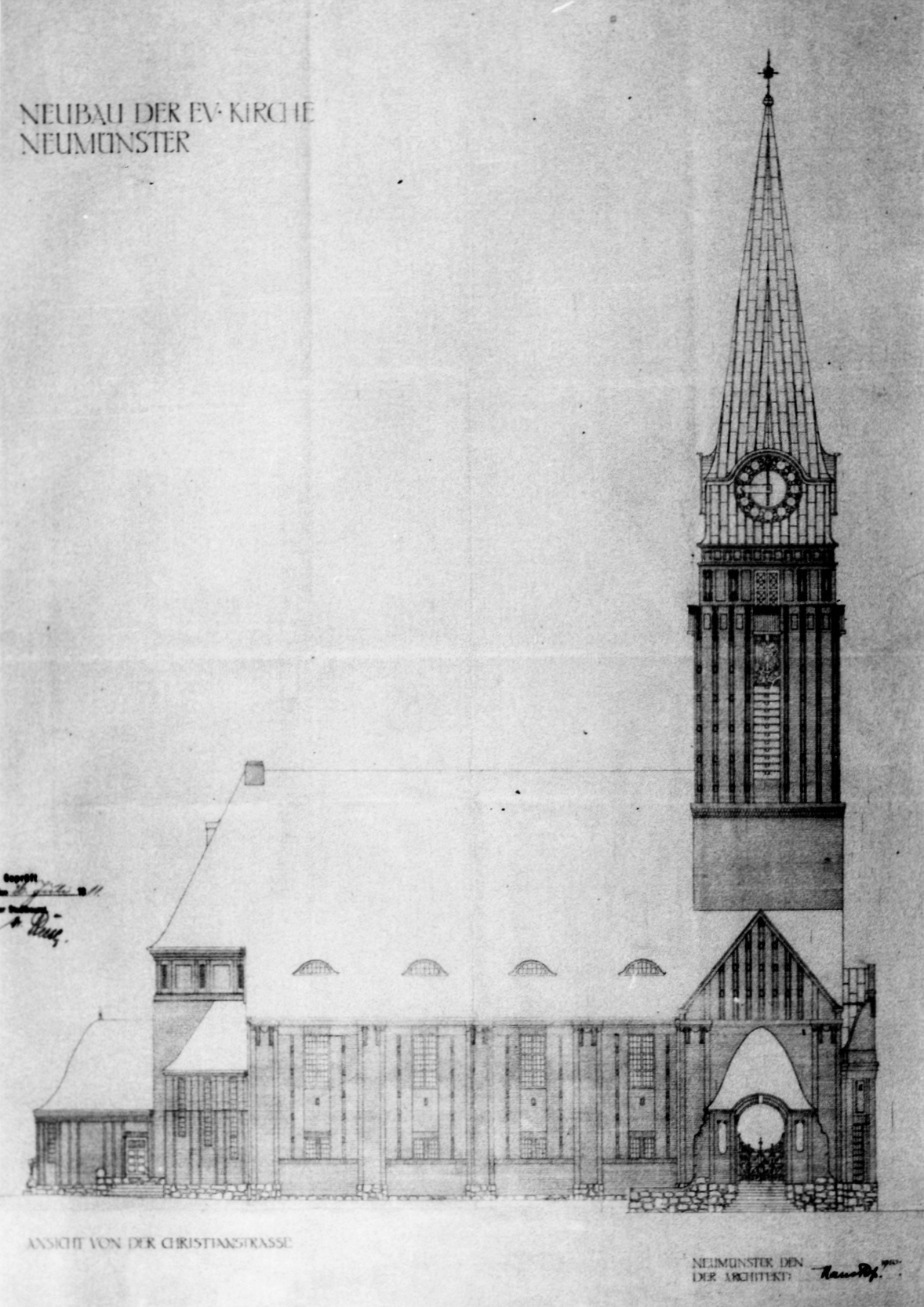 Wettbewerb und Neubau der Anscharkirche in Neumünster